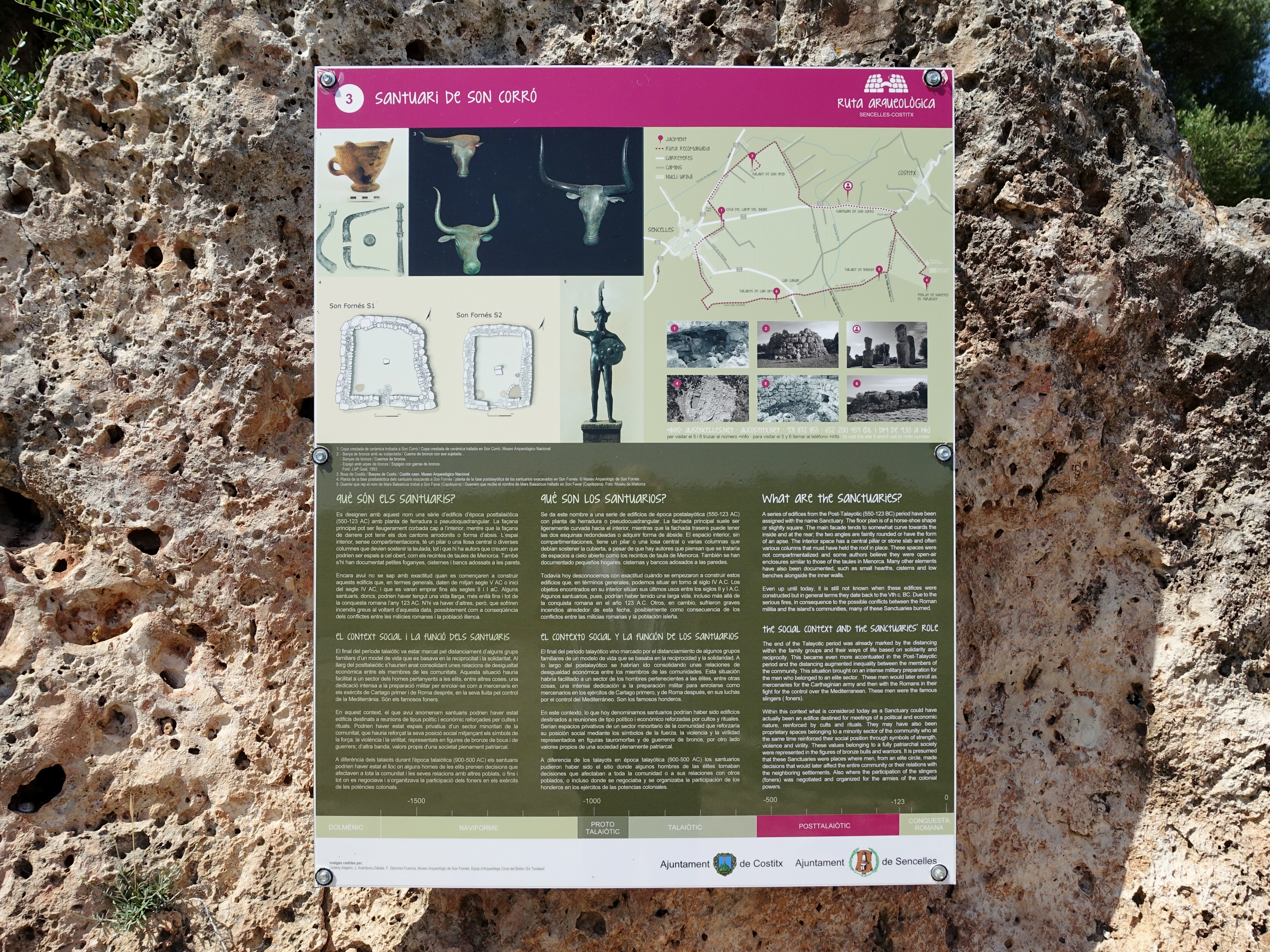 Hinweisschild zum Santuari de Son Corró, Gemeinde Costitx, Mallorca, Spanien